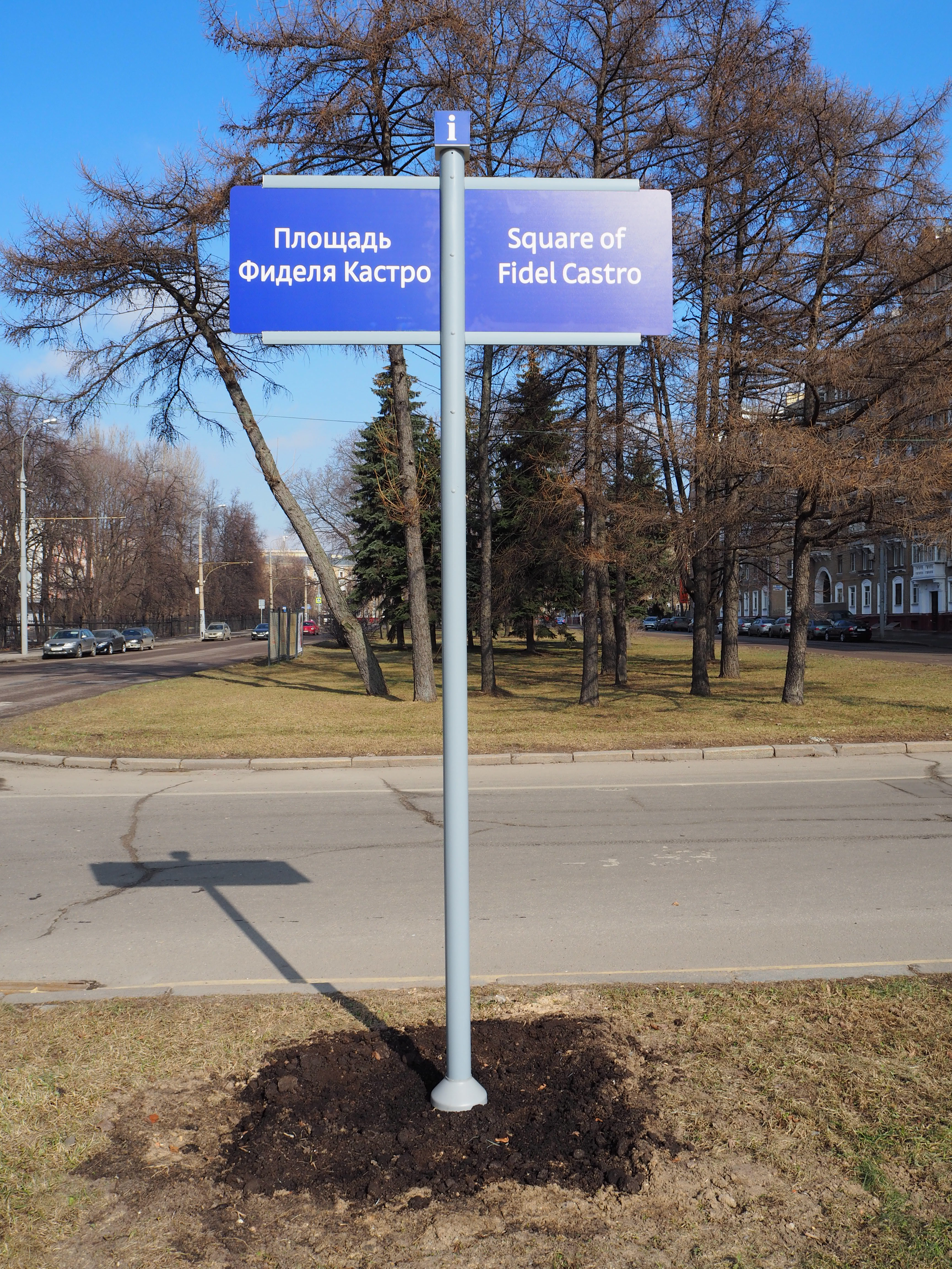 Площадь Фиделя Кастро в Москве